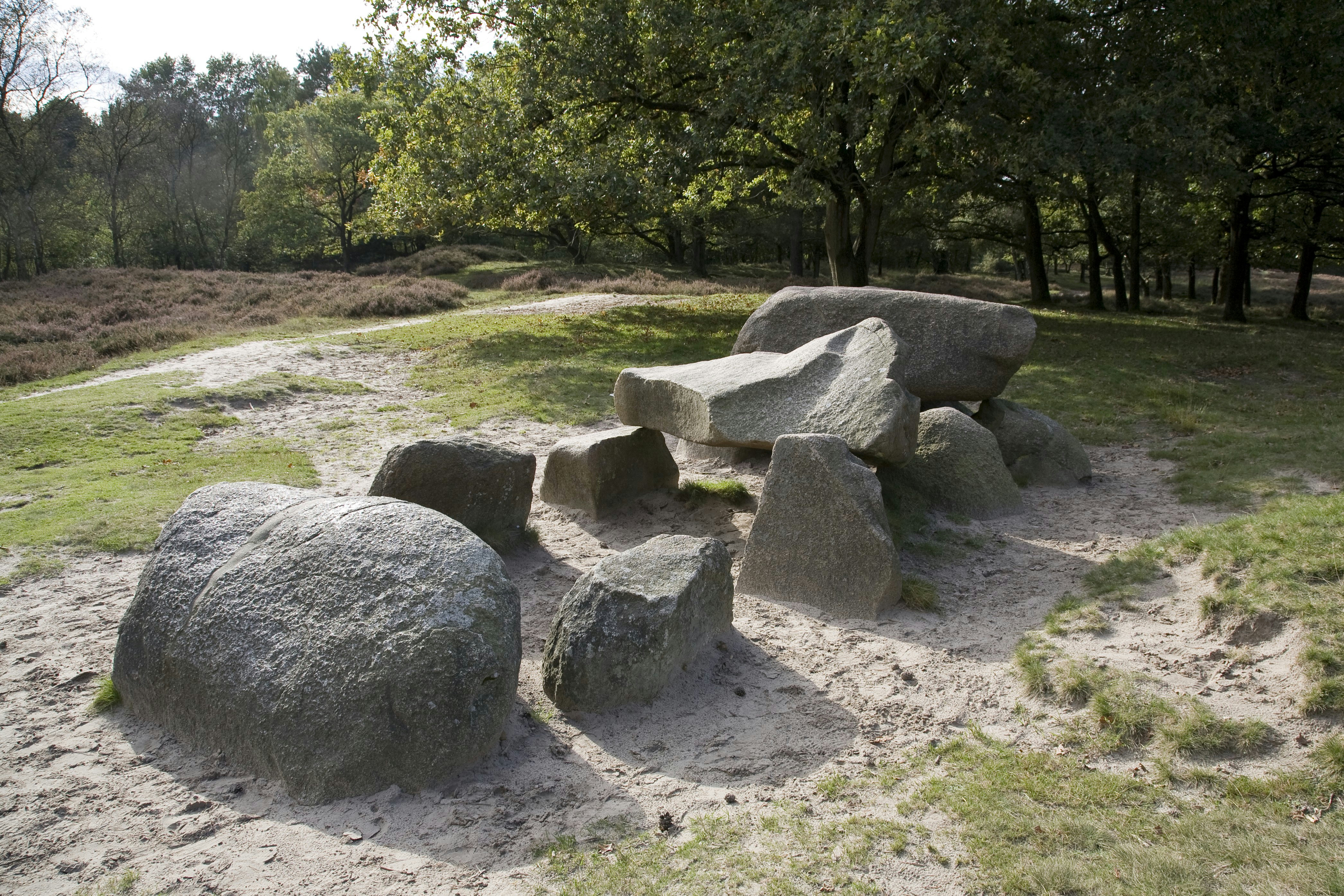 Hunebed D10: Hunebed, gelegen in de Gasterse Duinen (opmerking: Gemaakt voor publicatie landschapsbiografie Drentse Aa)